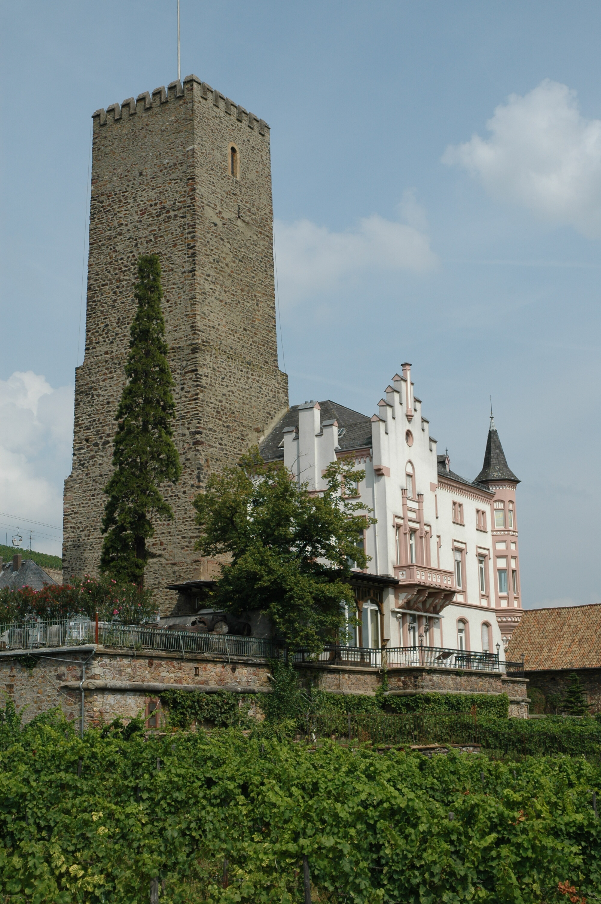 Boosenburg von Südwesten eigenes Foto Peter Weller